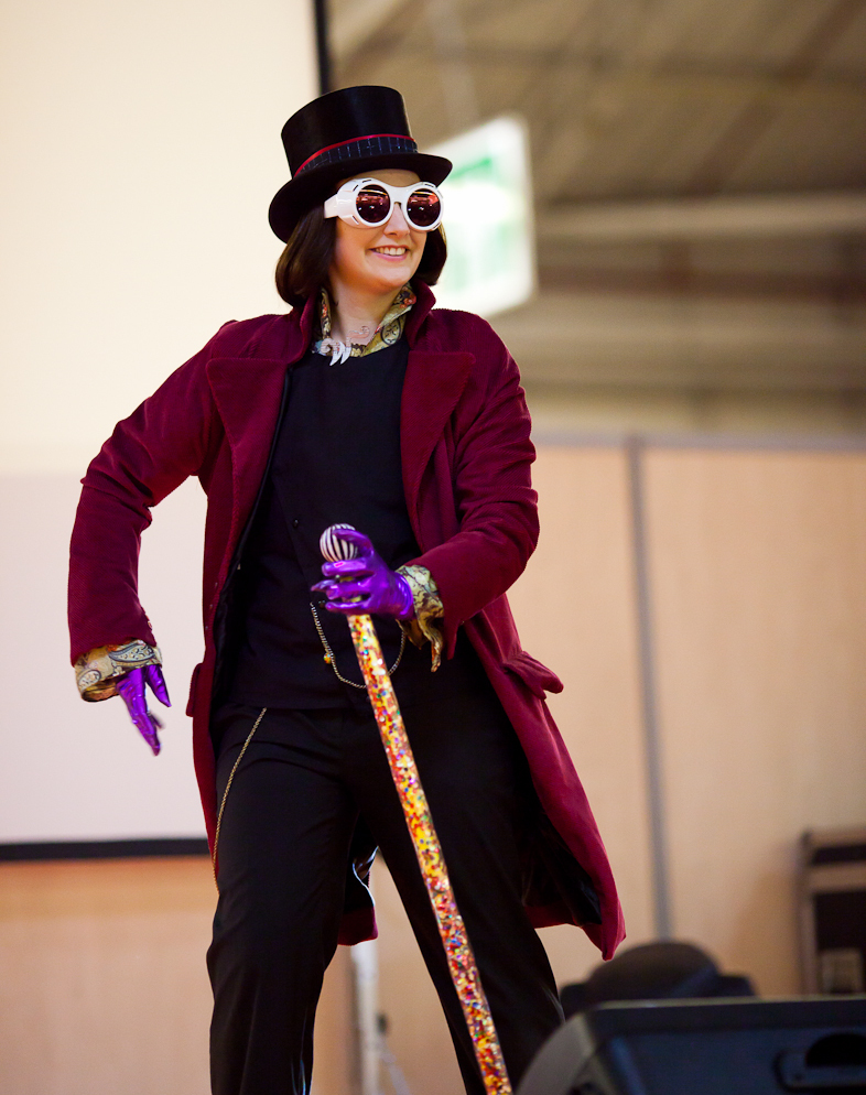 Paris Manga 10, September 2010, Parc des expositions de la porte de Versailles.